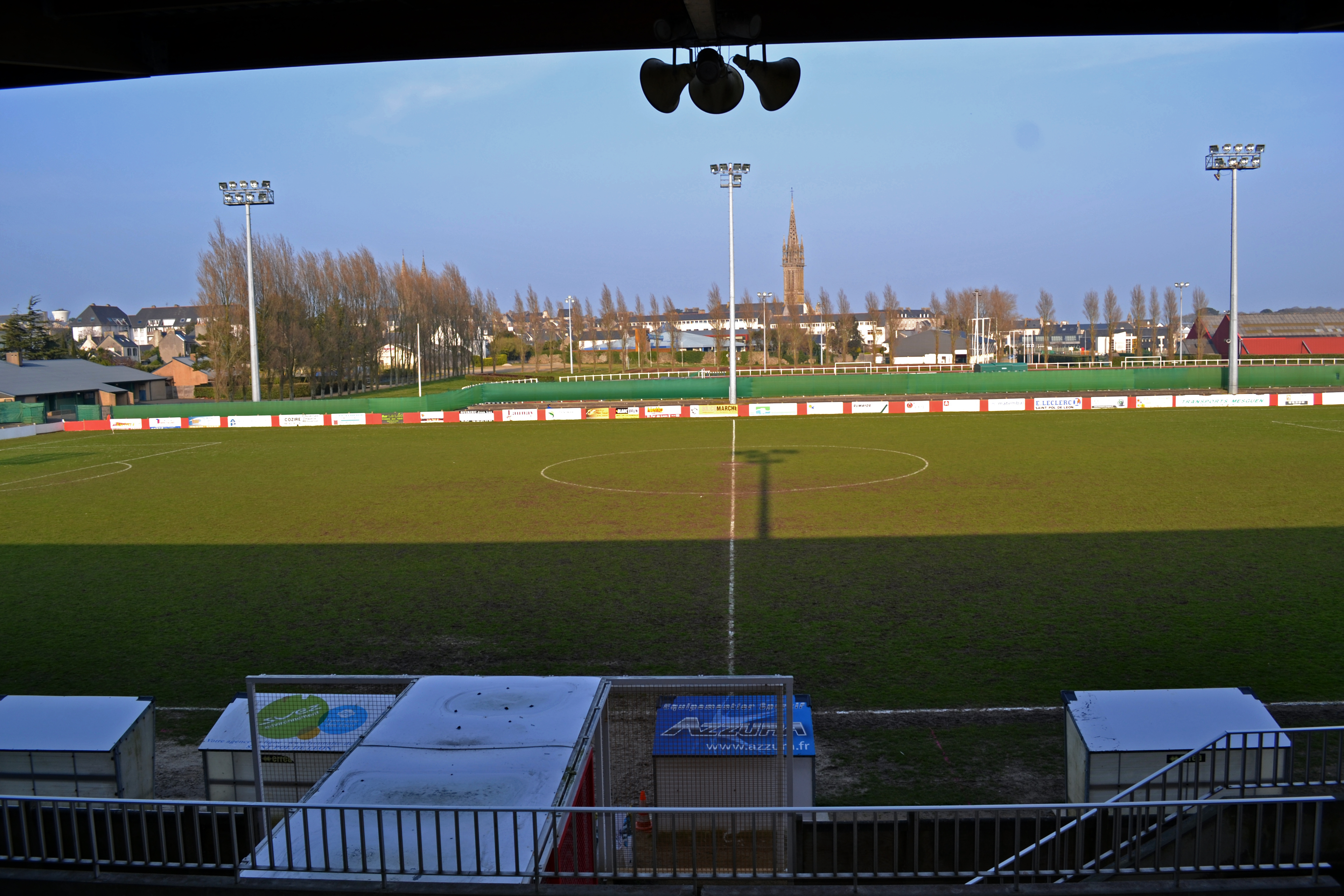 Vue des gradins du stade de football des Carmes à Saint-Pol-de-Léon.